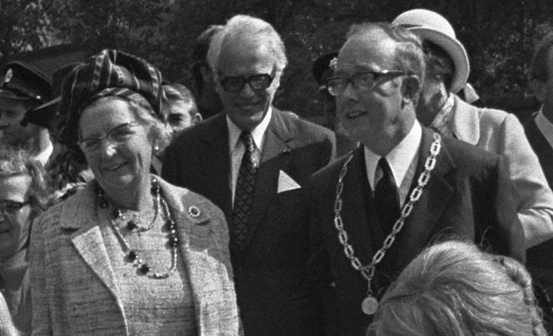 Collectie / Archief : Fotocollectie Anefo Reportage / Serie : [ onbekend ] Beschrijving : Koningin Juliana bezoekt Amerongen (Utrecht) begeleid door de burgemeester. Verklede kinderen zingen een liedje onder leiding van een schooljuffrouw achter een lessenaar Datum : 20 september 1974 Locatie : Amerongen, Utrecht (provincie) Trefwoorden : burgemeesters, koninginnen, koninklijke bezoeken, scholen Persoonsnaam : Juliana (koningin Nederland) Fotograaf : Mieremet, Rob / Anefo, [onbekend] Auteursrechthebbende : Nationaal Archief Materiaalsoort : Negatief (zwart/wit) Nummer archiefinventaris : bekijk toegang 2.24.01.05 Bestanddeelnummer : 927-4654